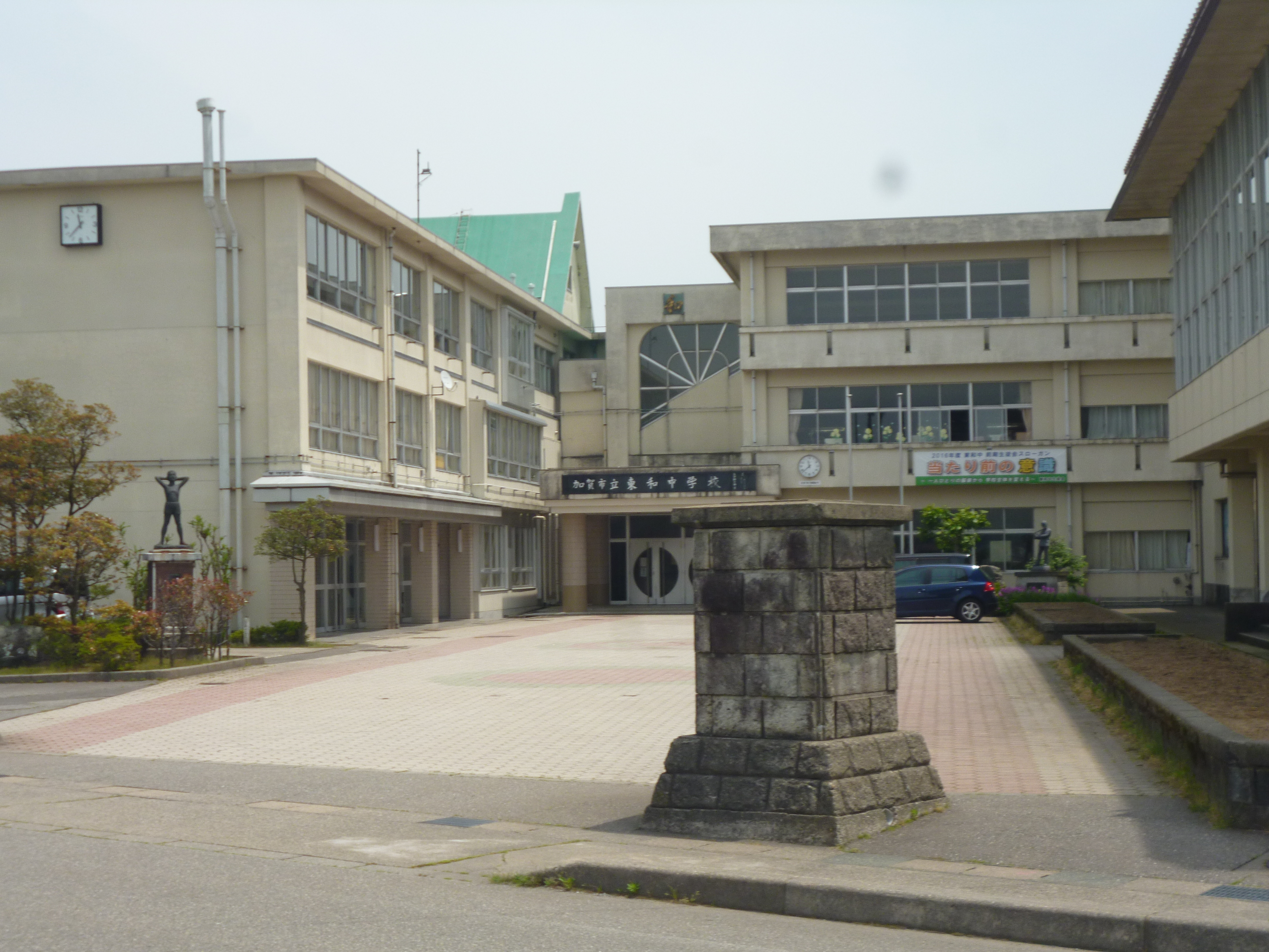 加賀市立東和中学校の校門側からの撮影